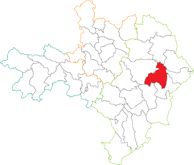 Situation du canton dans le département du Gard (France)